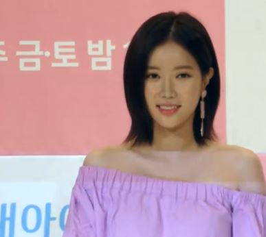 26일 오후 서울시 영등포구 타임스퀘어 아모리스홀에서 JTBC 금토드라마 '내아이디는 강남미인'의 제작발표회